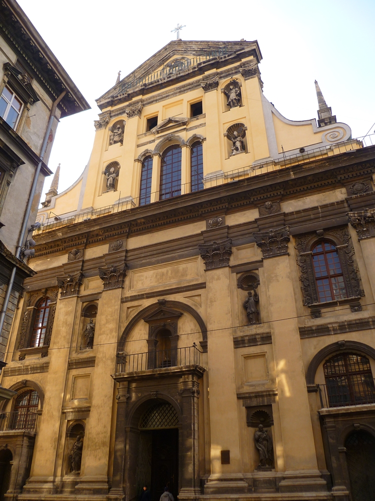 костел езуїтів